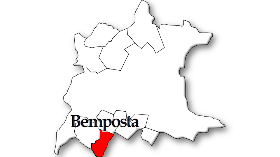 População